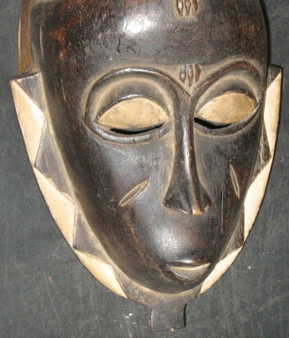 masque Baoulé de Cote d'Ivoire